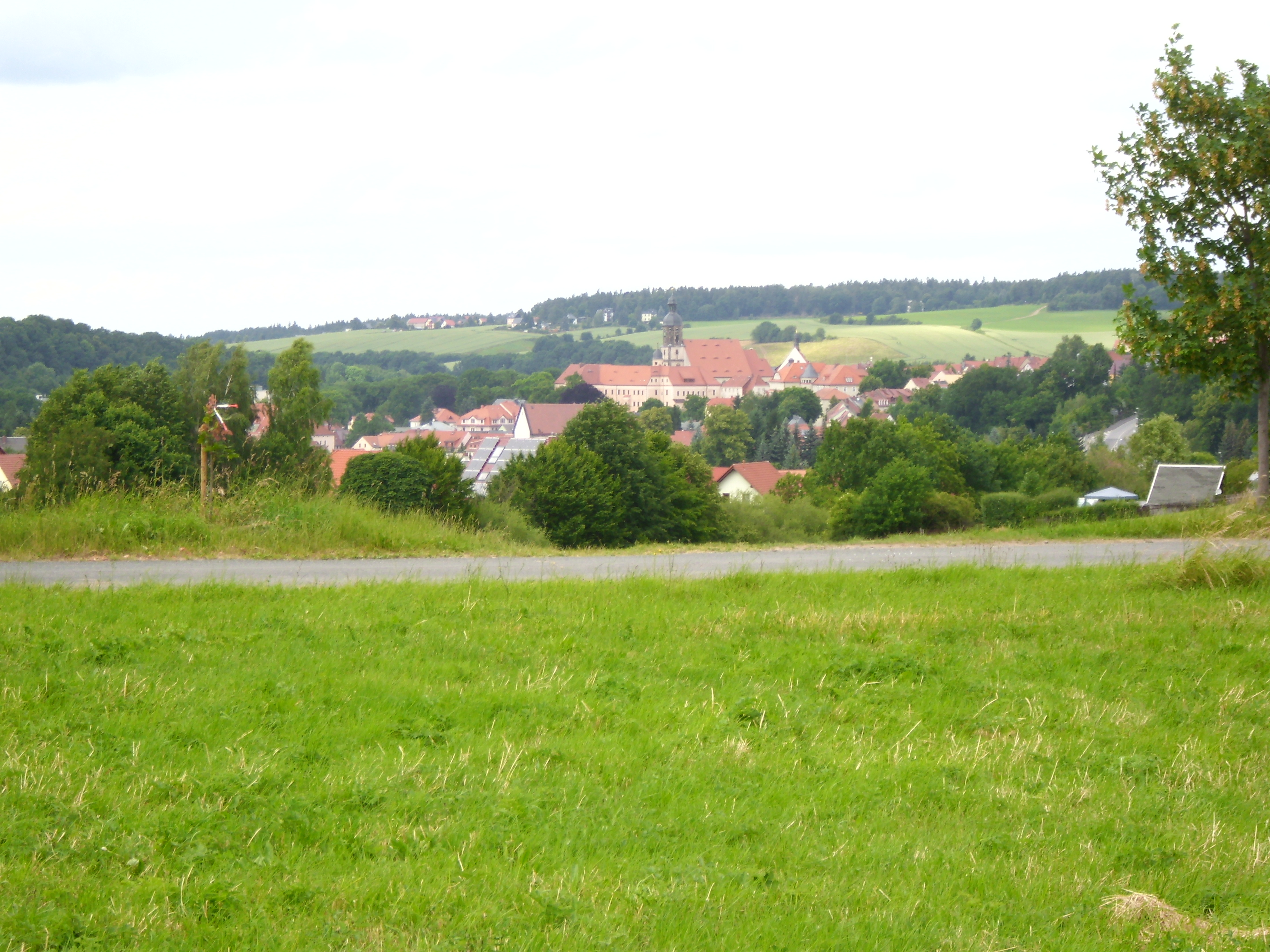 Blick von der Wolframsdorfer Straße (von Süden) auf Dippoldiswalde mit Schloss